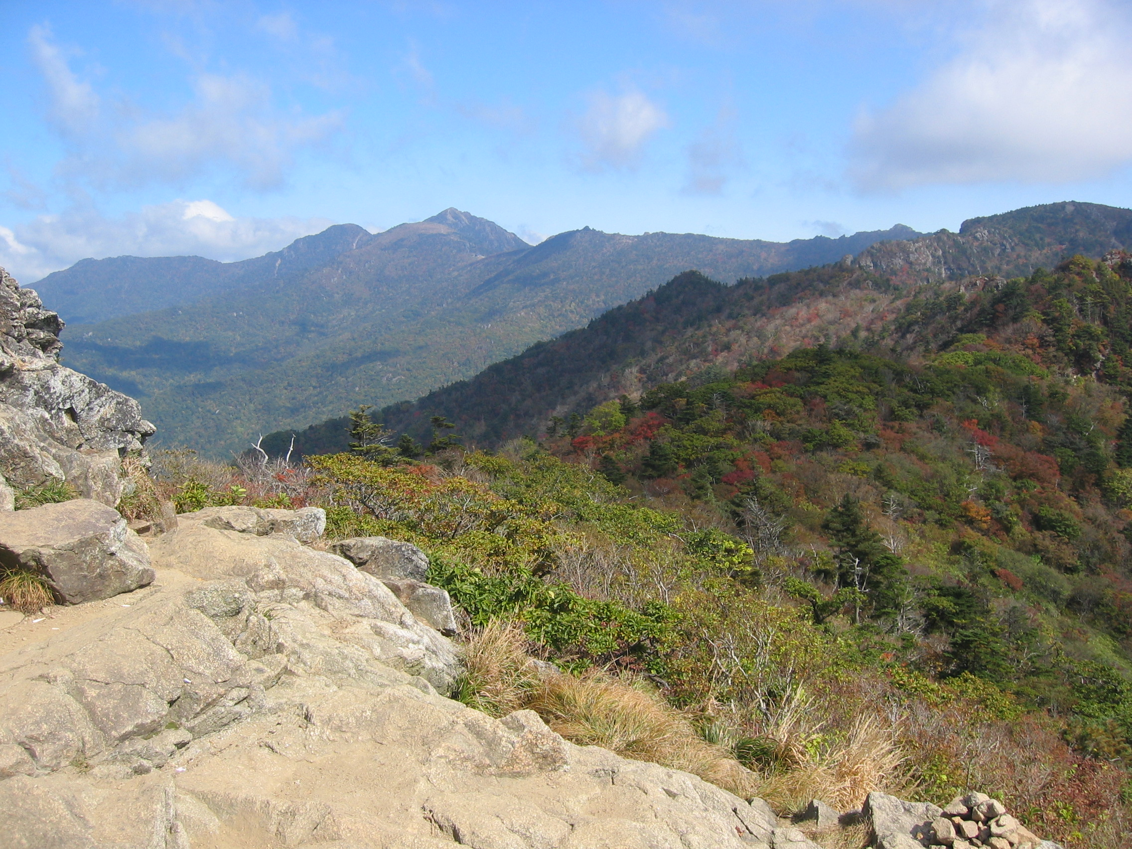 2006년 대한민국 지리산의 모습 The scenery of Jirisan, in South Korea, 2006